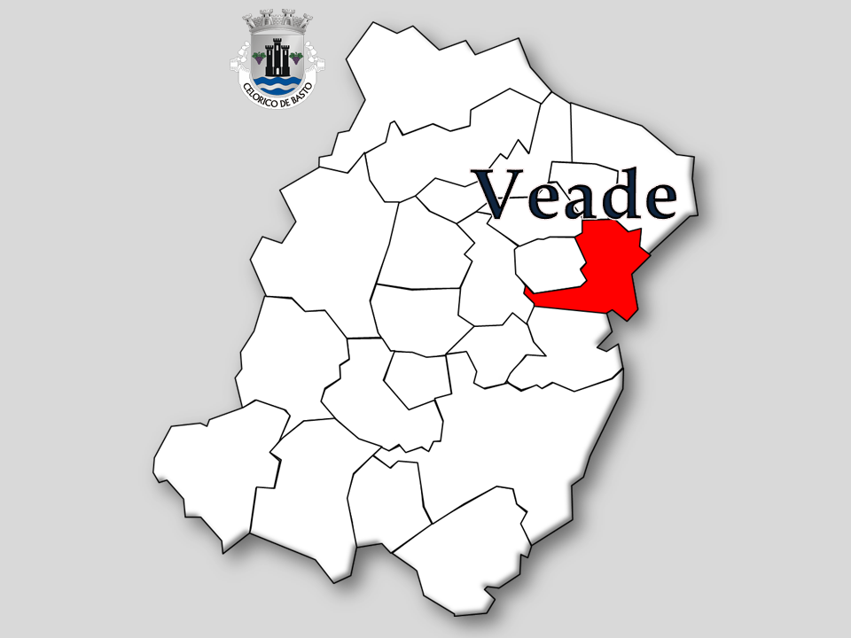 Censos 1864/2011